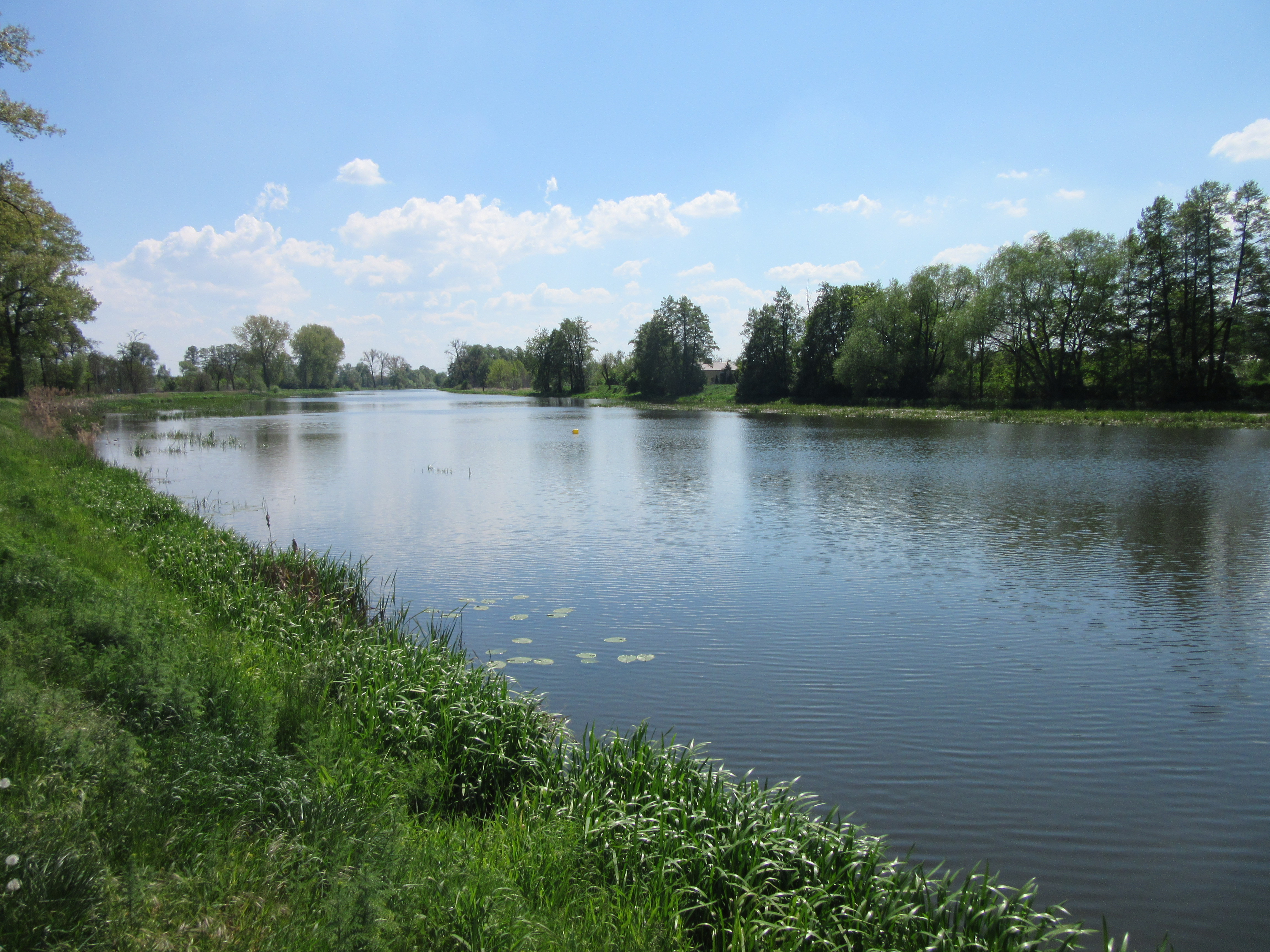 Prosna w Kaliszu